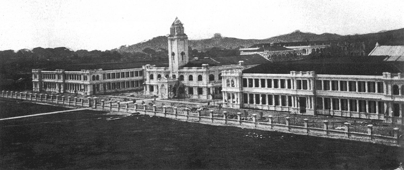 位於廣州文明路的國立中山大學校址。